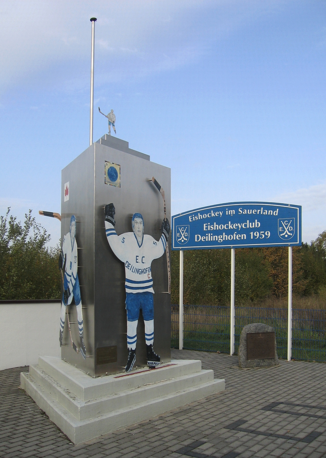 ECD-Erinnerungsstätte in Hemer-Deilinghofen. Errichtung im Jahr 2004. Künstlerische Gestaltung: Friedrich Rabanus. Planung und Fertigung: Klein oHG Ladenbau & Drahtwaren.